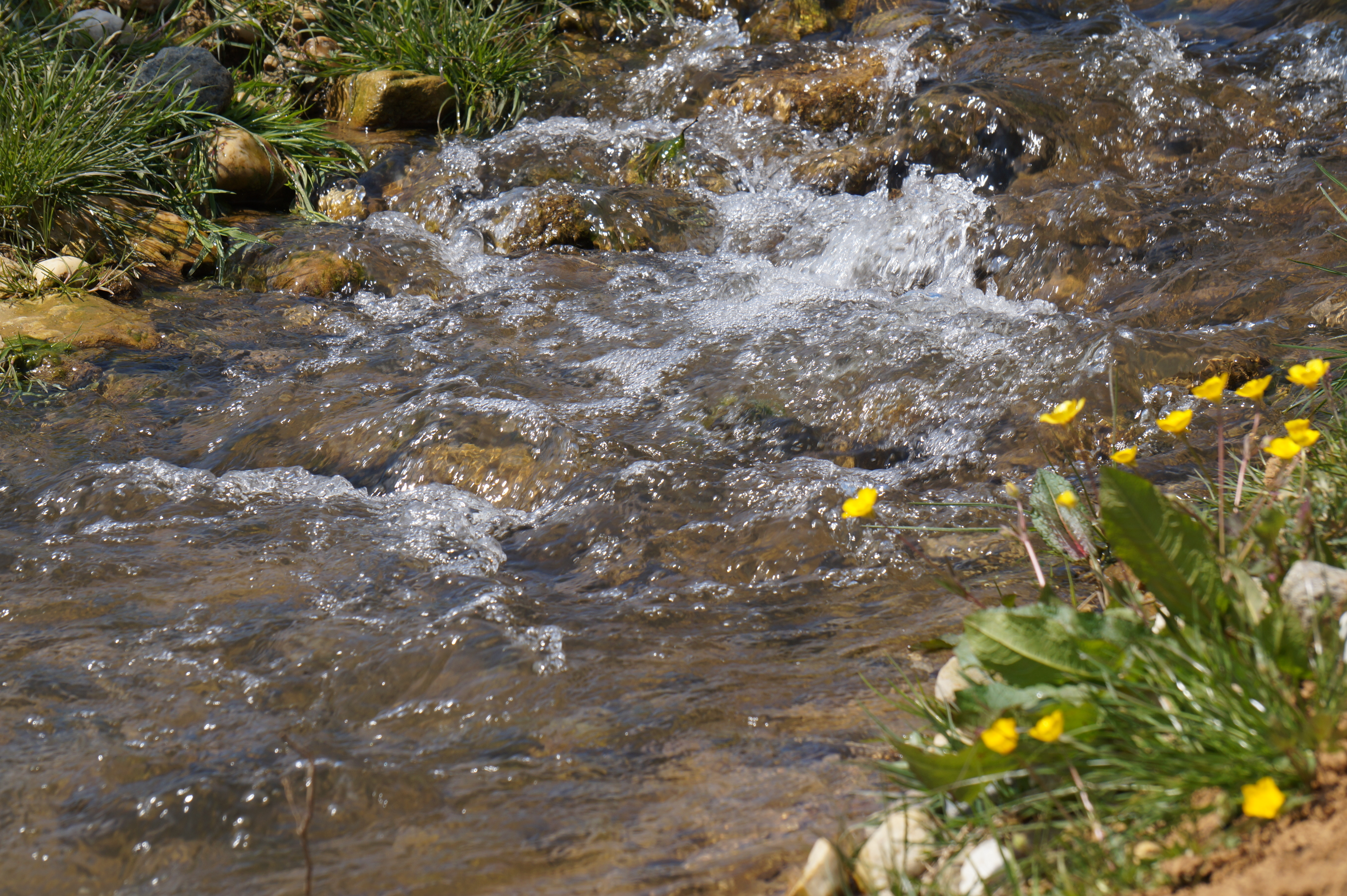 Wasserreigen am Ammerbach